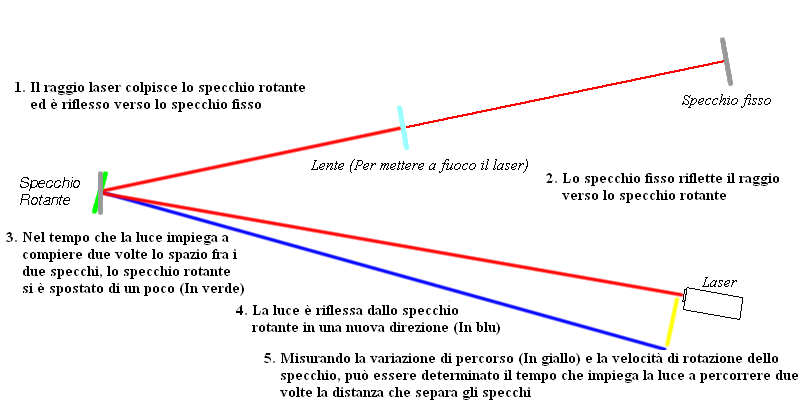 Esperimento di Foucault sulla velocità della luce effettuato con raggio laser Foucault experiment to determine the speed of the light